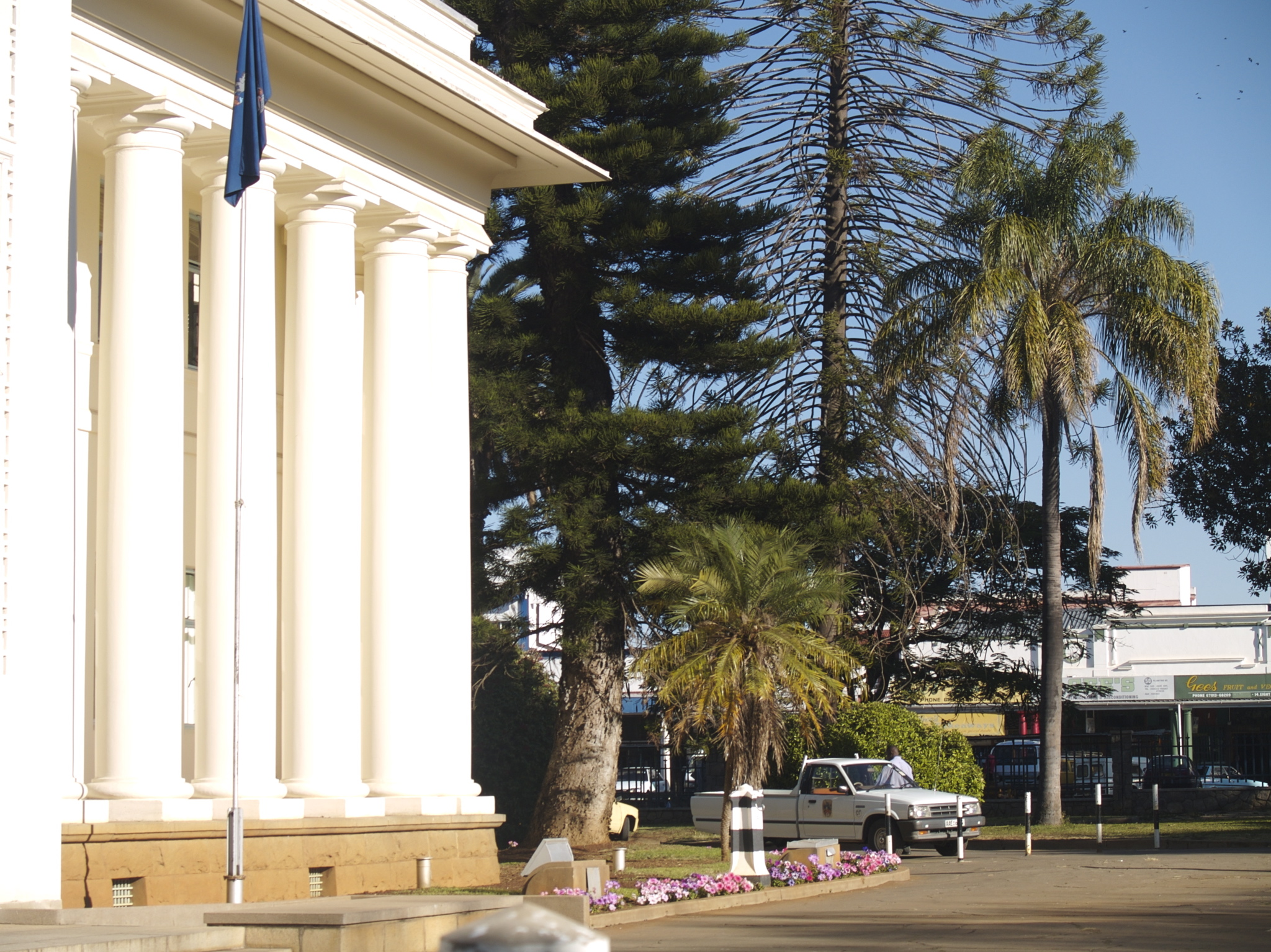 Bulawayo City Hall